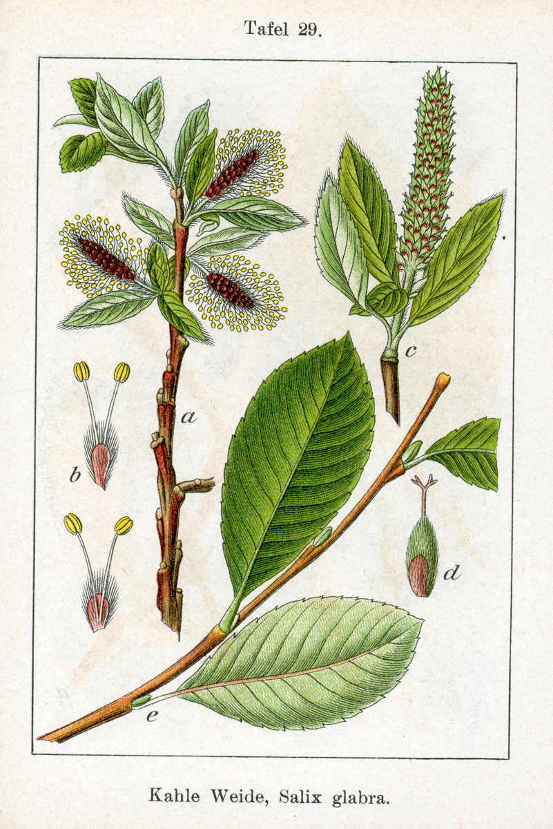 Kahle Weide, Salix glabra Scop. Original Description Kahle Weide, Salix glabra